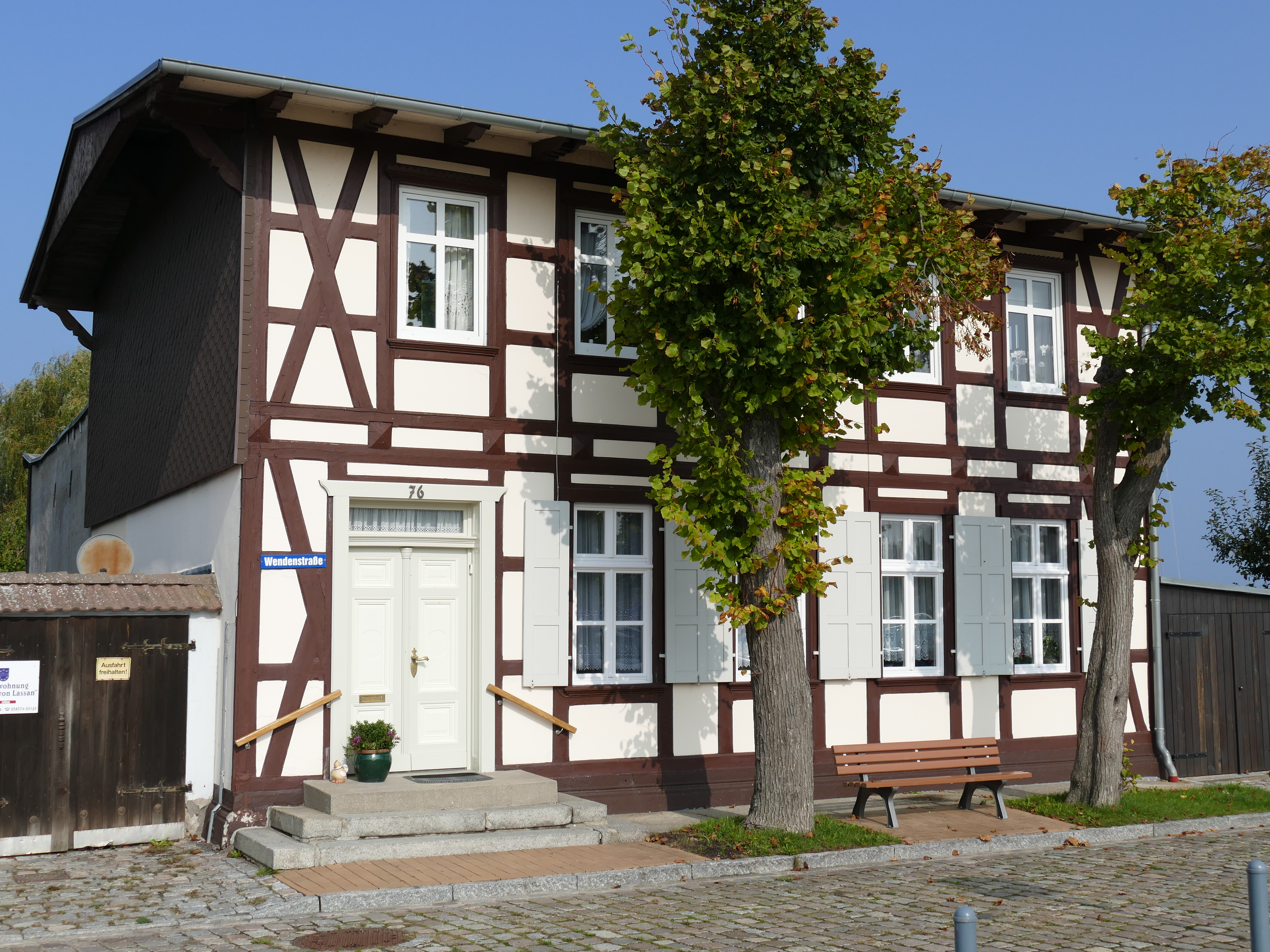 Lassan, Wendenstrasse 76, Fachwerkhaus am Hafen